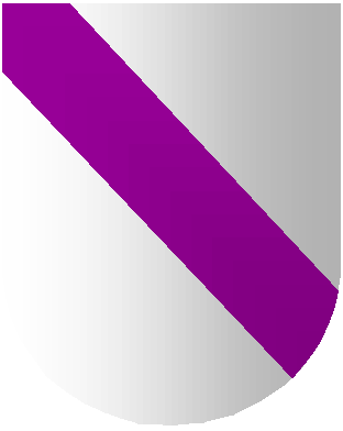 Escudo de armas de la familia Otermin